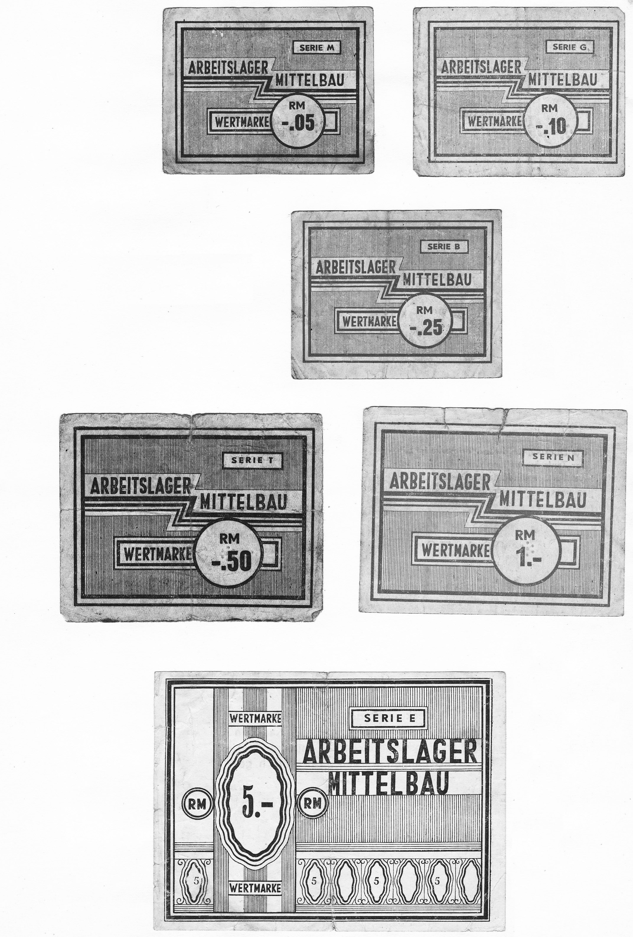 Peníze používané v KZ Dora-Mittelbau